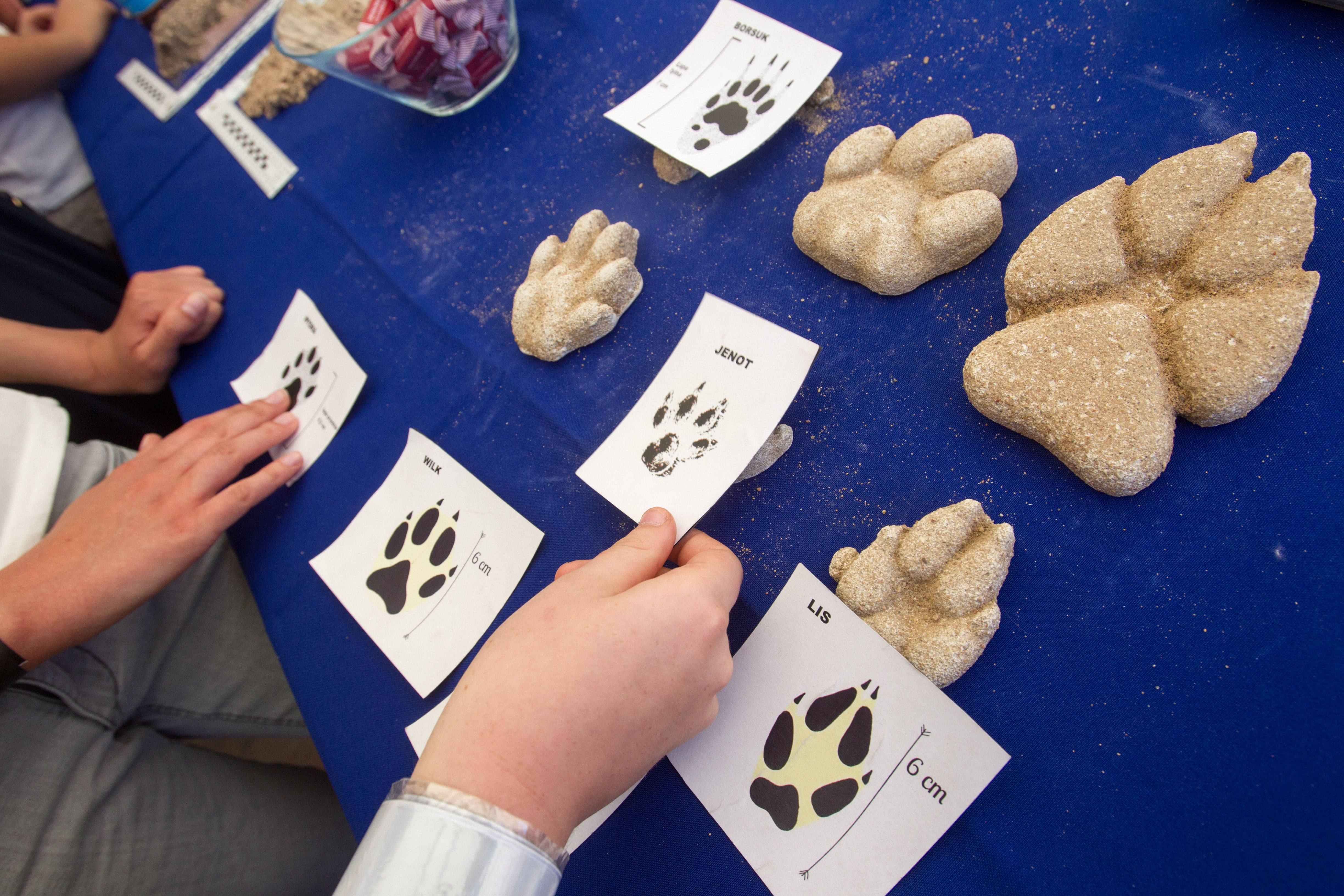 Piknik Naukowy - 2017 r., Centrum Nauki Kopernik i Polskie Radio.